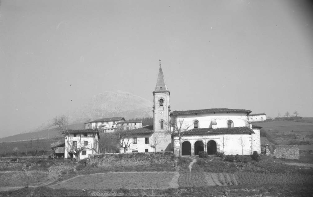 Uribarri auzoa, atzean Udalatx mendia duela.